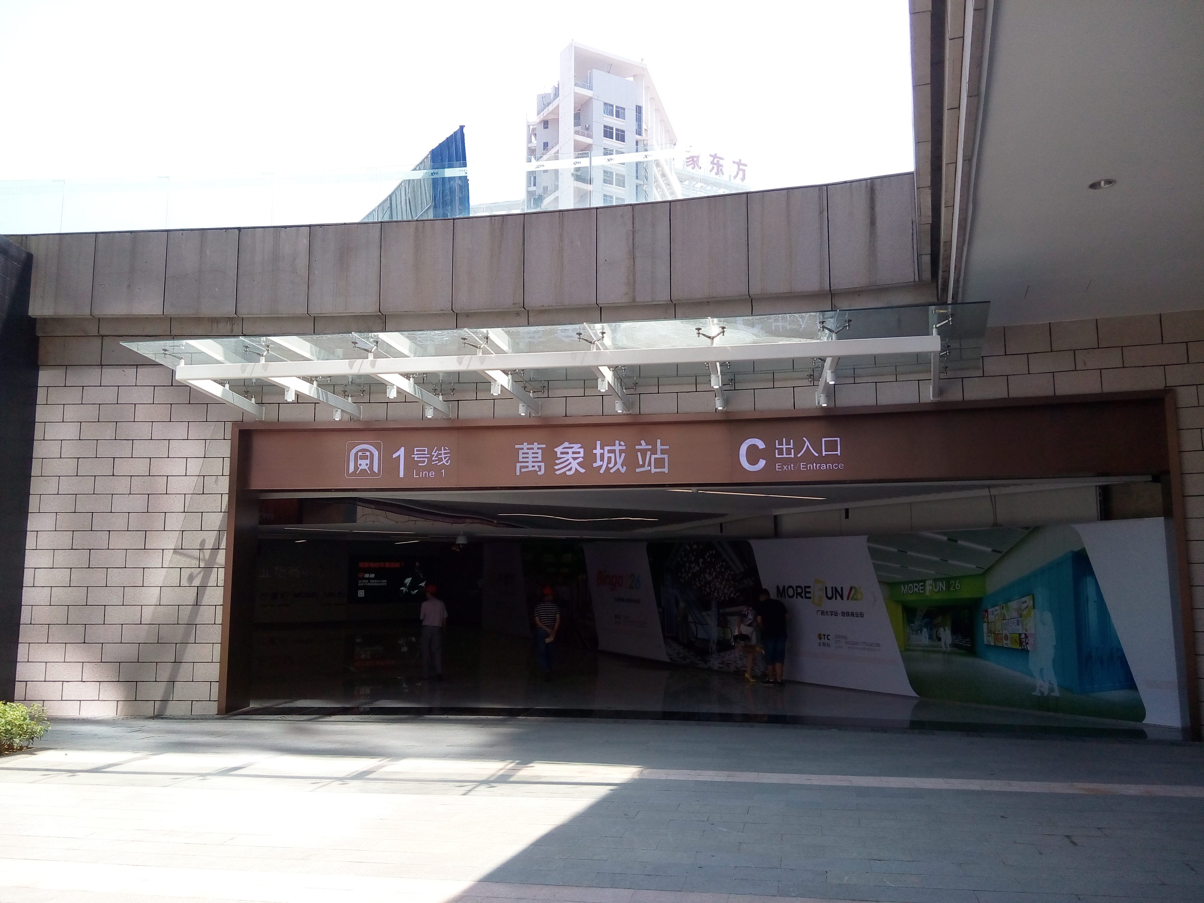 南宁轨道交通